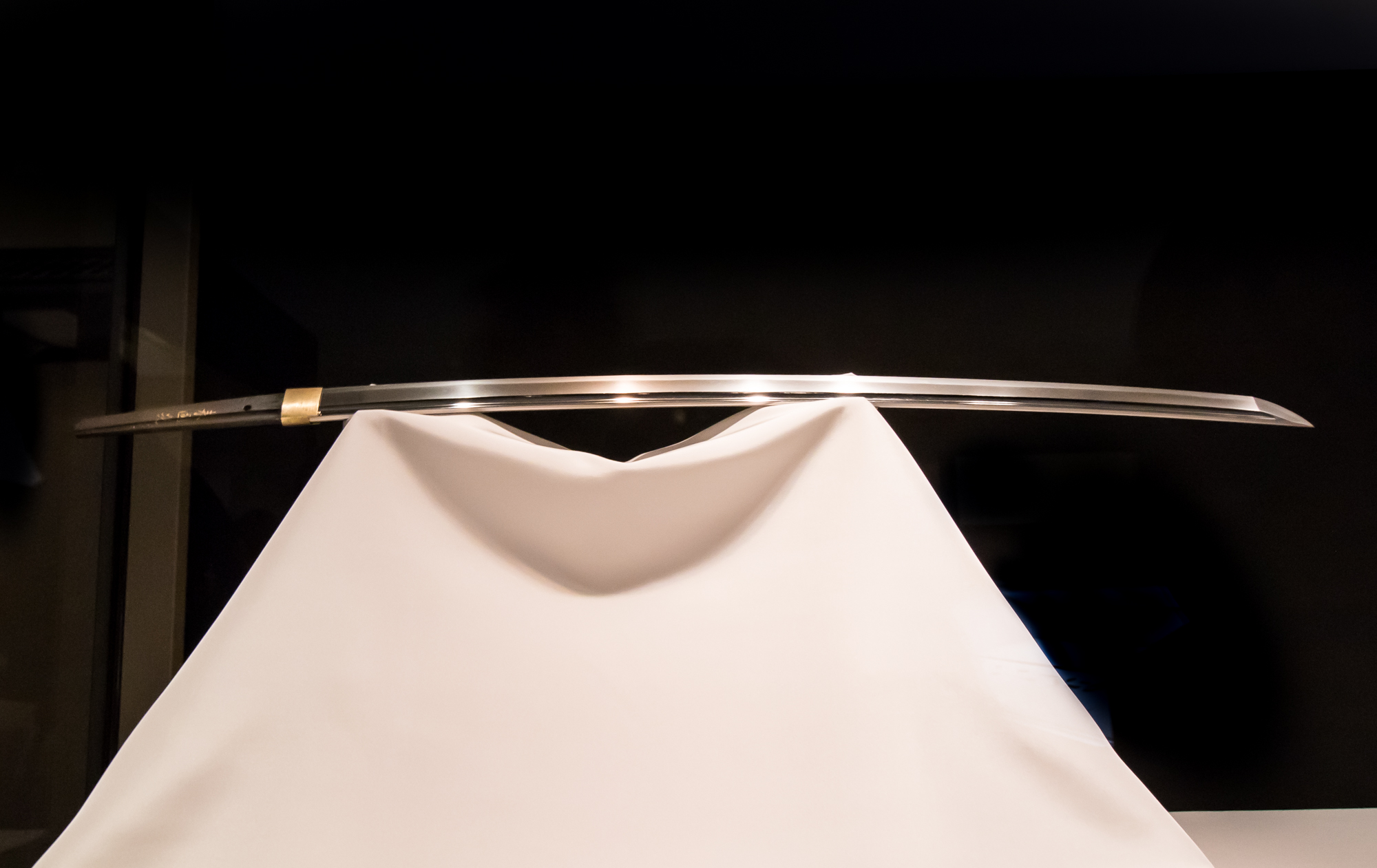 刀。金象嵌銘「来国光」 スリ上 本阿（花押）。重要文化財。鎌倉時代（14世紀）。